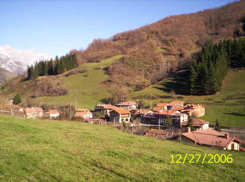 Areños, barrio de Cosgaya en diciembre del 2006. Cosgaya es una localidad del municipio de Camaleño, en Cantabria, España.